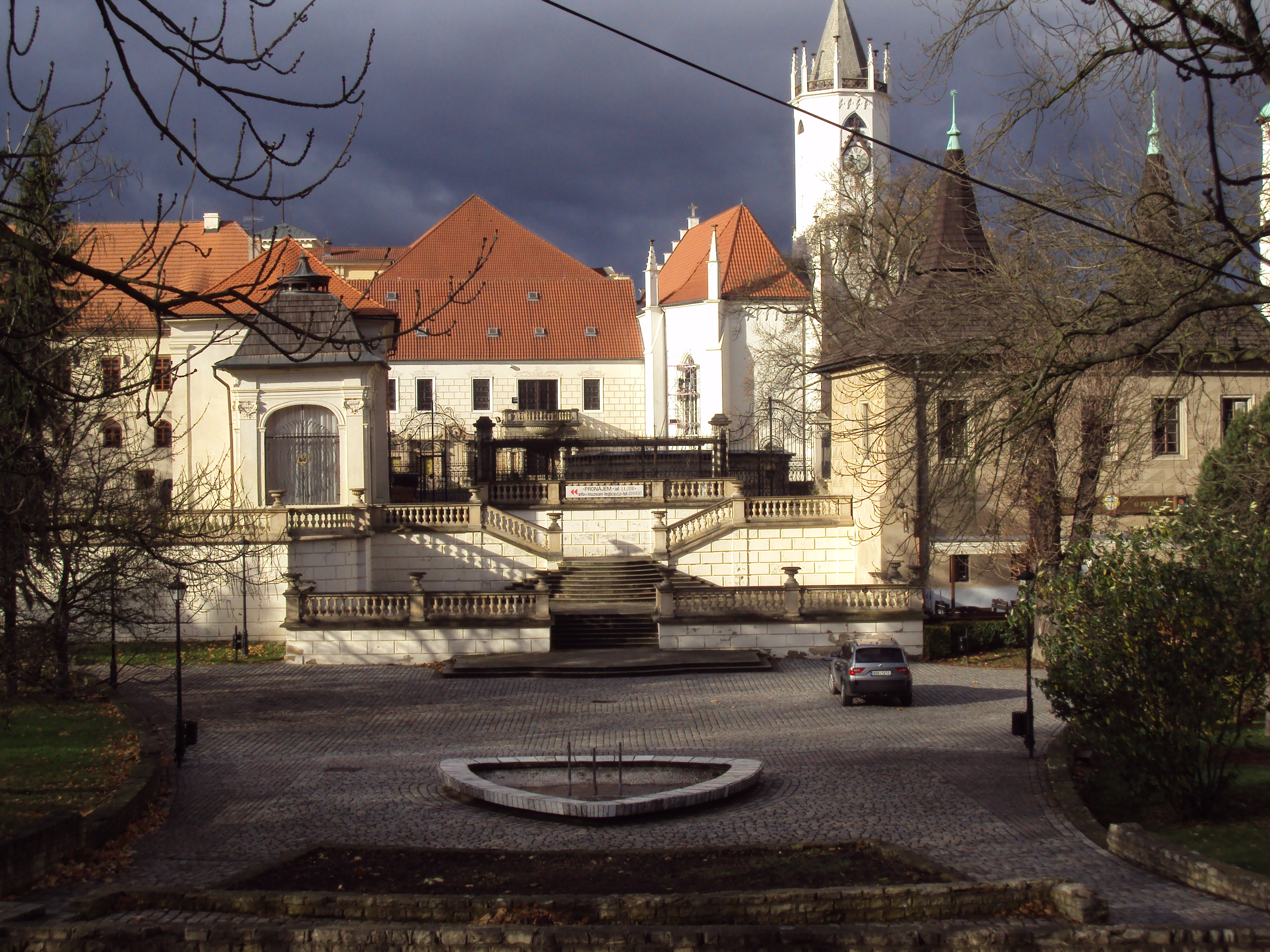 Pohled od Letné, z boku zámku. U vřídla, Ptačí napajedlo, Ptačí schody.